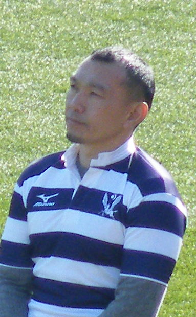 第50回全国大学ラグビーフットボール選手権大会の記念セレモニーに登場した元木由記雄氏